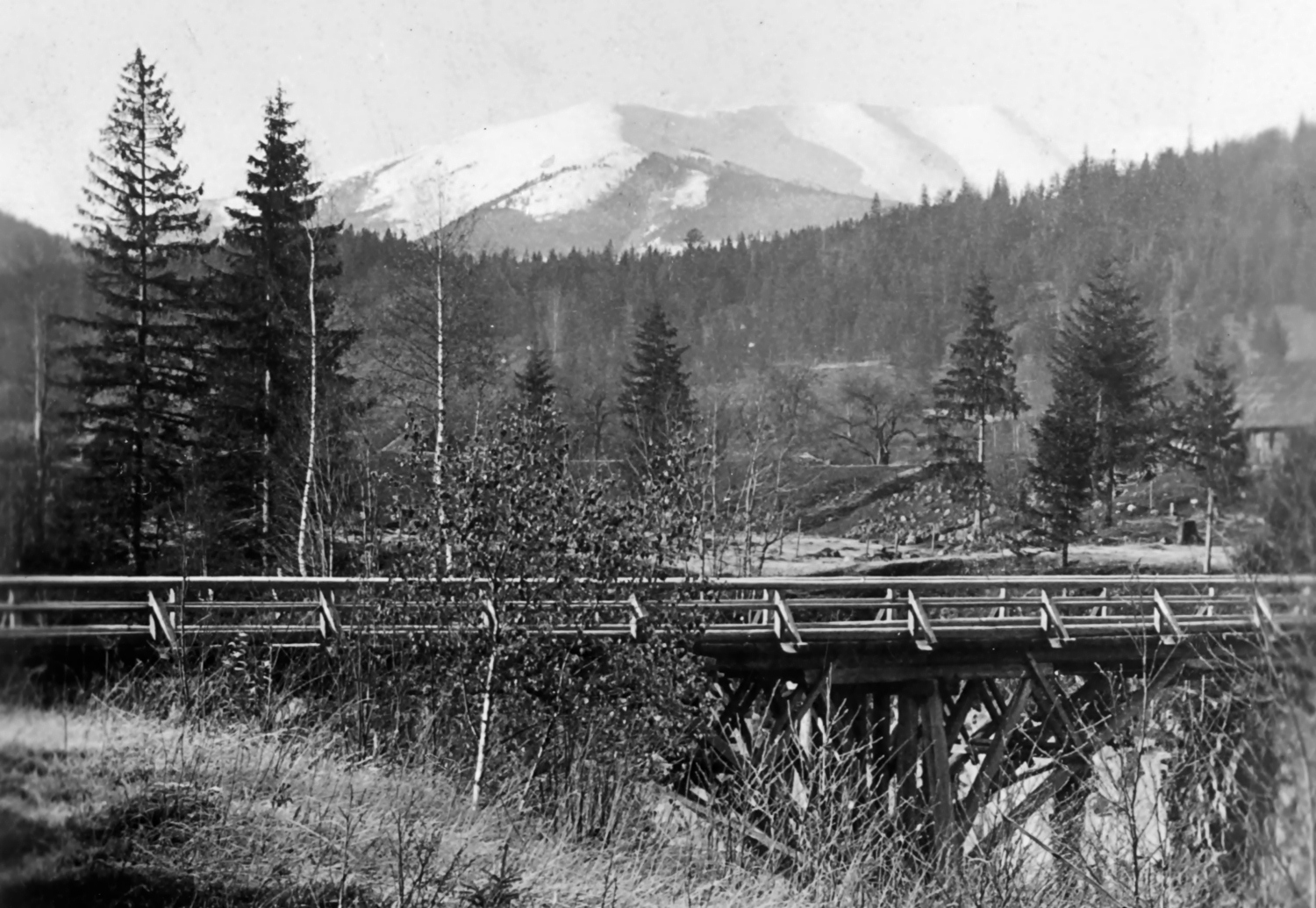 Okolice Sołotwiny, drewniany most nad Bystrzycą Sołotwińską zbudowany przed 1914; stan w roku 1936 (?; przed 1939); w tle Sywula - najwyższy szczyt Gorganów